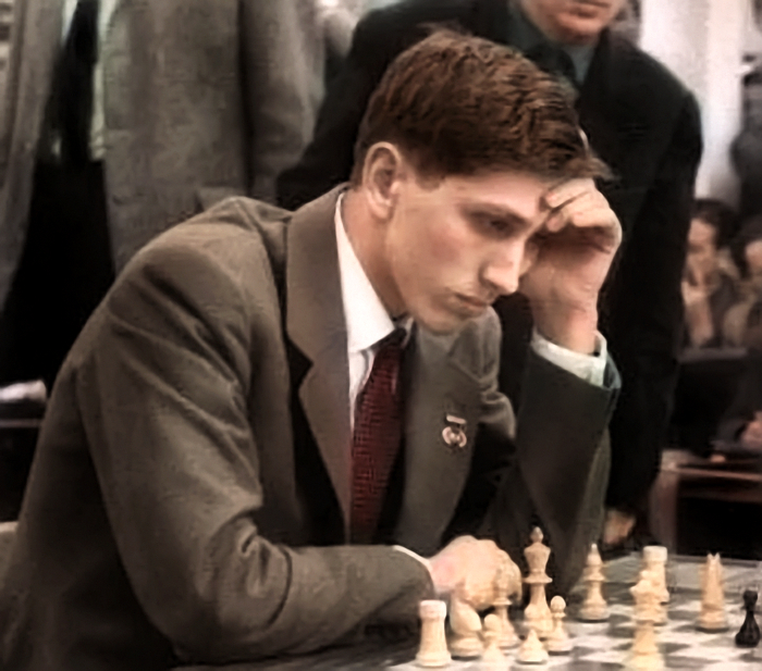 Bobby Fischer 1960 en Leipzig en color